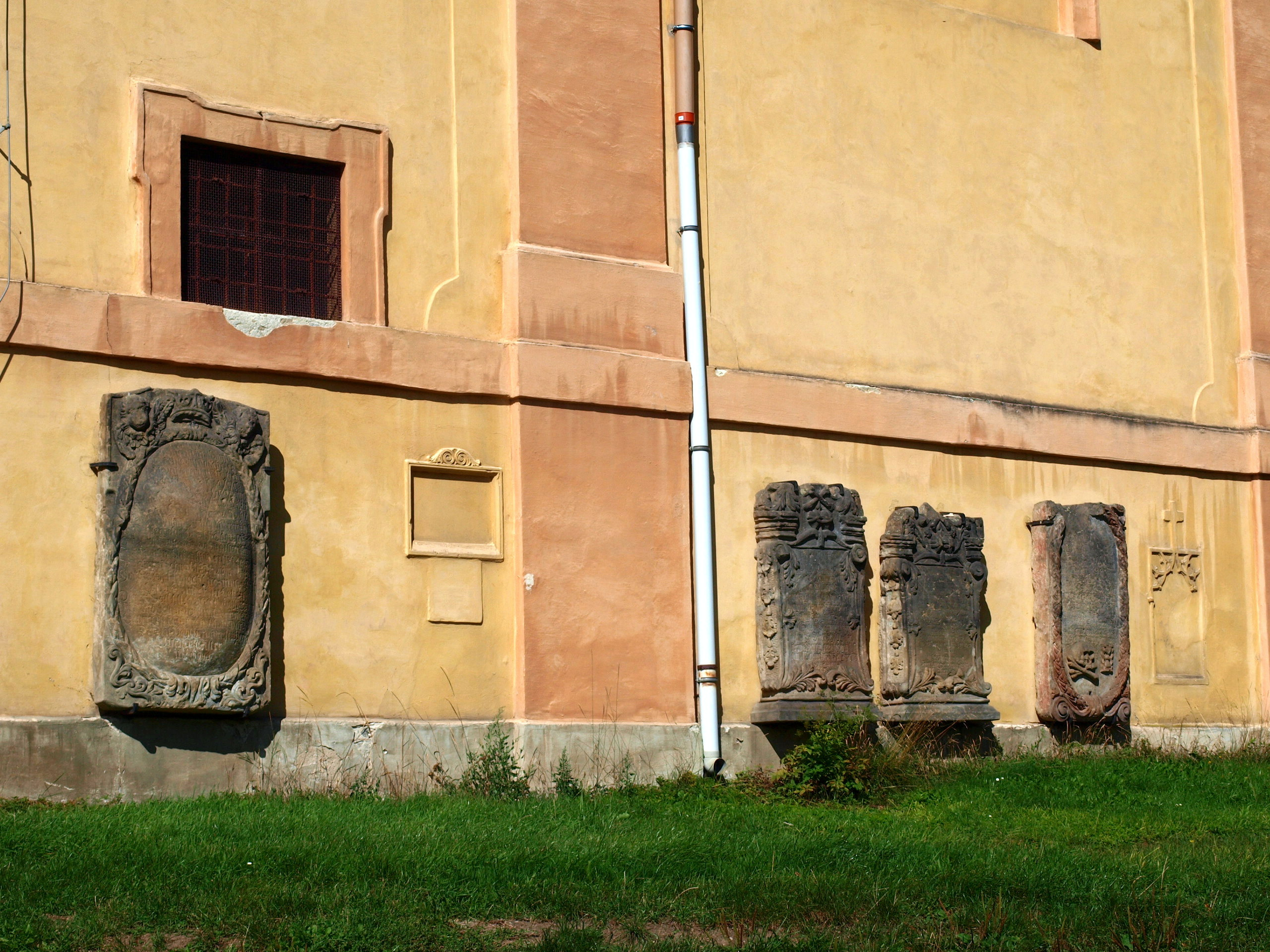 Česká Lípa